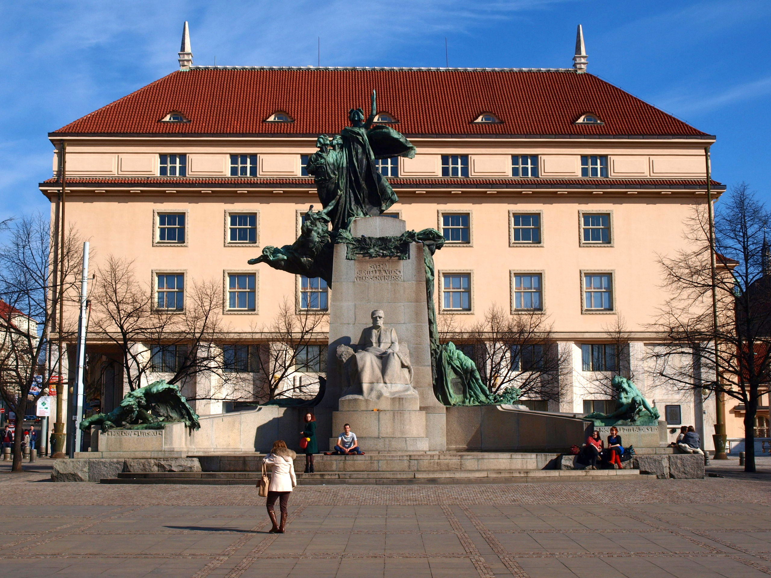 Emauzský klášter